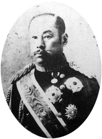 a Japanese man 有栖川宮熾仁 (Taruhito Arisugawanomiya)